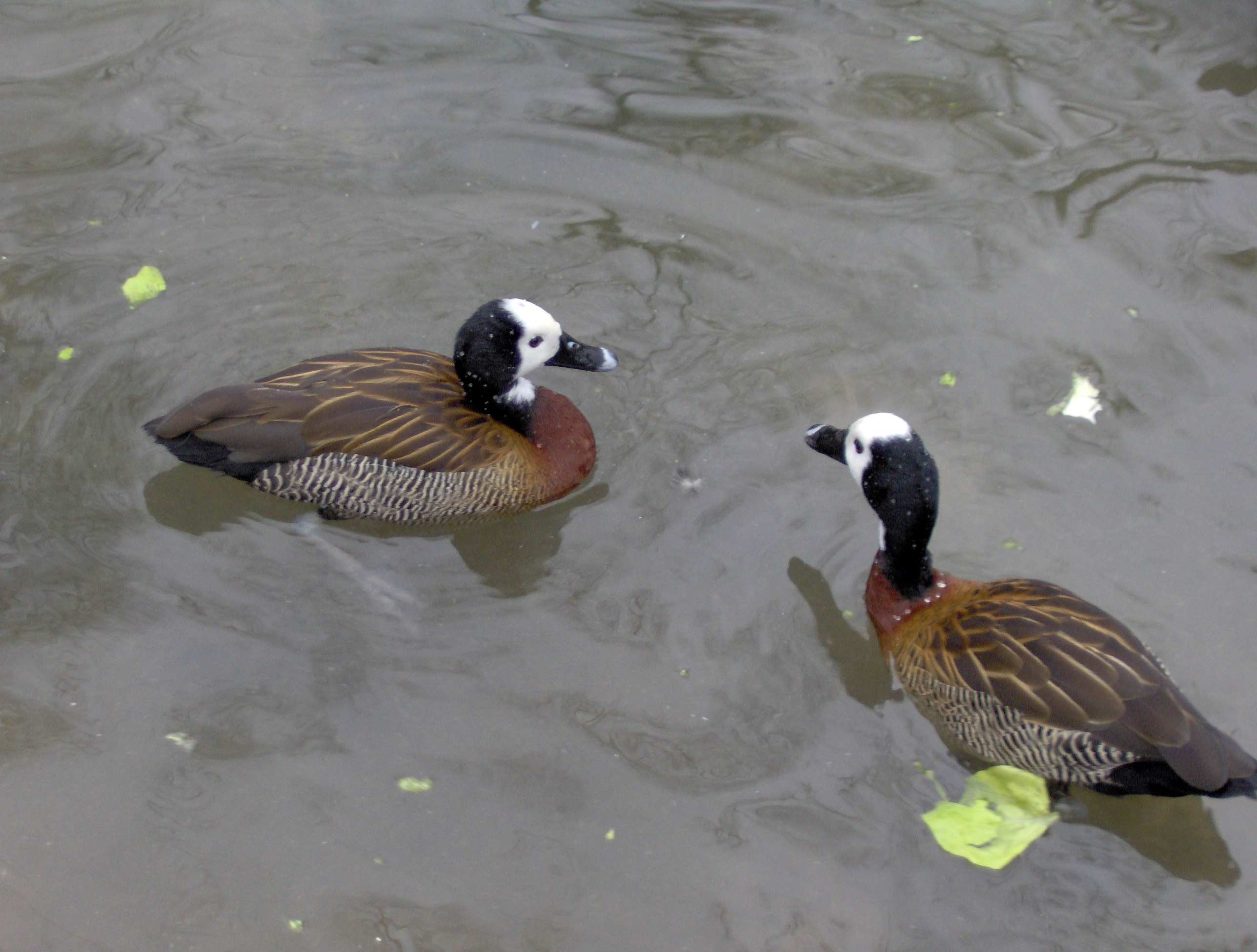 Apáca-fütyülőlúd a Fővárosi Állat- és Növénykertben.